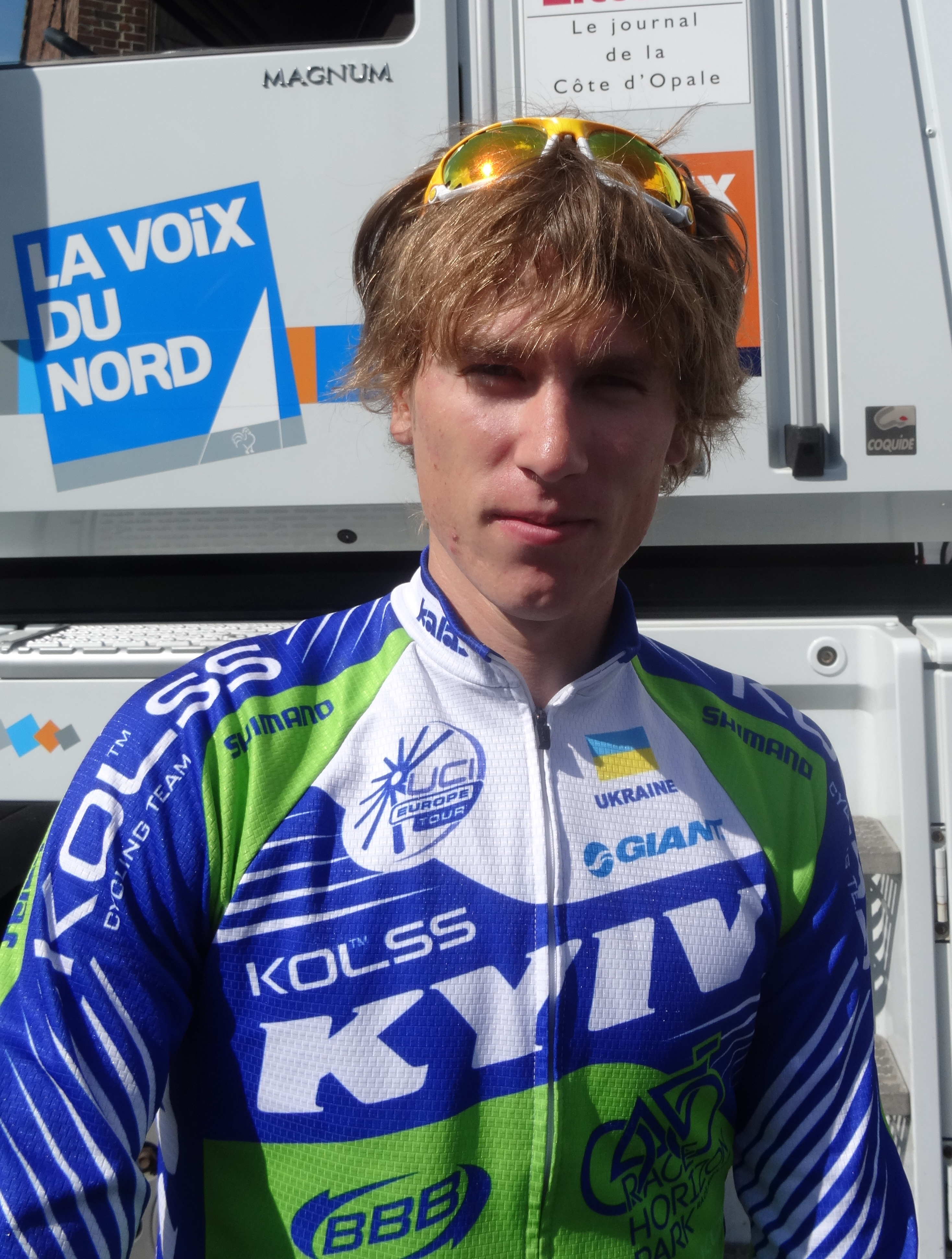 Reportage photographique réalisé le vendredi 23 mai 2014 à l'occasion du départ de la première étape du Paris-Arras Tour 2014 à Lens, Pas-de-Calais, Nord-Pas-de-Calais, France. Depicted person: Oleksandr Golovash